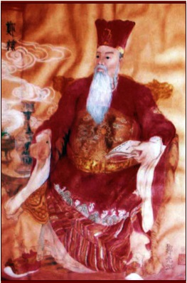 Trịnh Kiểm (chữ Hán: 鄭檢, 1503 – 1570) là người mở đầu sự nghiệp nắm quyền của họ Trịnh và gián tiếp tạo nên tình trạng vua Lê - chúa Trịnh tại Bắc Hà (miền Bắc Việt Nam ngày nay) cũng như là đầu mối của chiến tranh Trịnh-Nguyễn sau này. Đương thời khi cầm quyền ông không xưng là chúa nhưng được đời sau truy tôn là Thái Vương. Ông là người nắm quyền chỉ huy quân đội trong triều các vua Lê thời Nam Bắc triều từ năm 1545 tới khi mất (tháng 2 năm Mậu Ngọ, 1570).